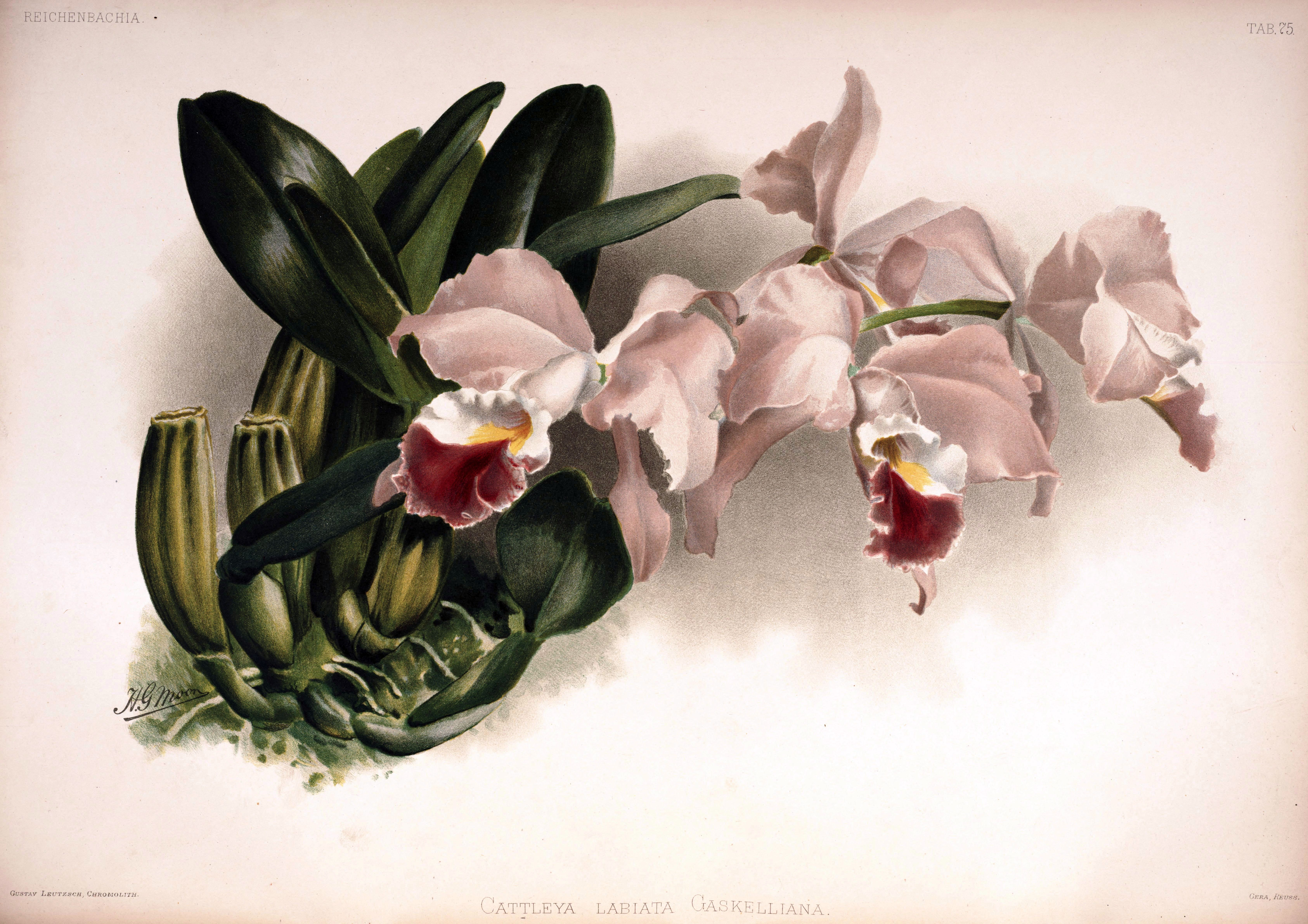 Cattleya gaskelliana as syn.: Cattleya labiata var. gaskelliana